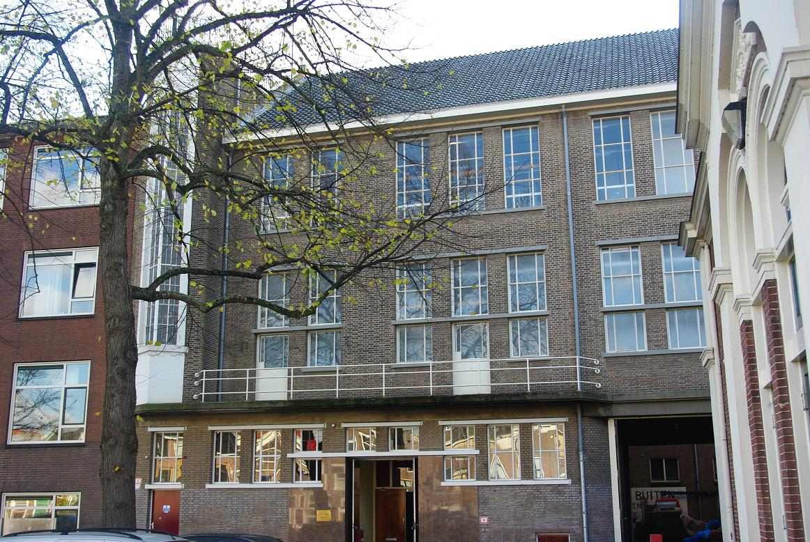 Societeit Quintus Boommarkt 5a